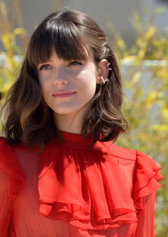 Stacy Martin au festival de Cannes